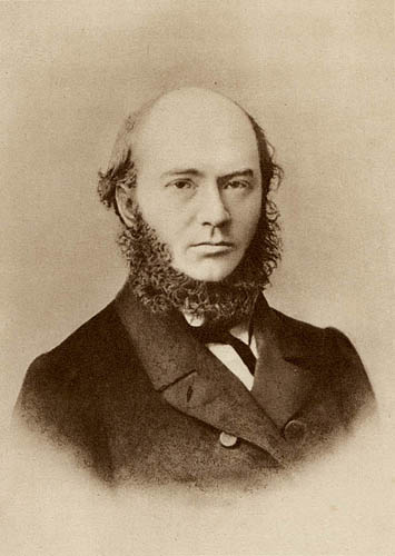 Ровинский, Дмитрий Александрович (1824 - 1895)